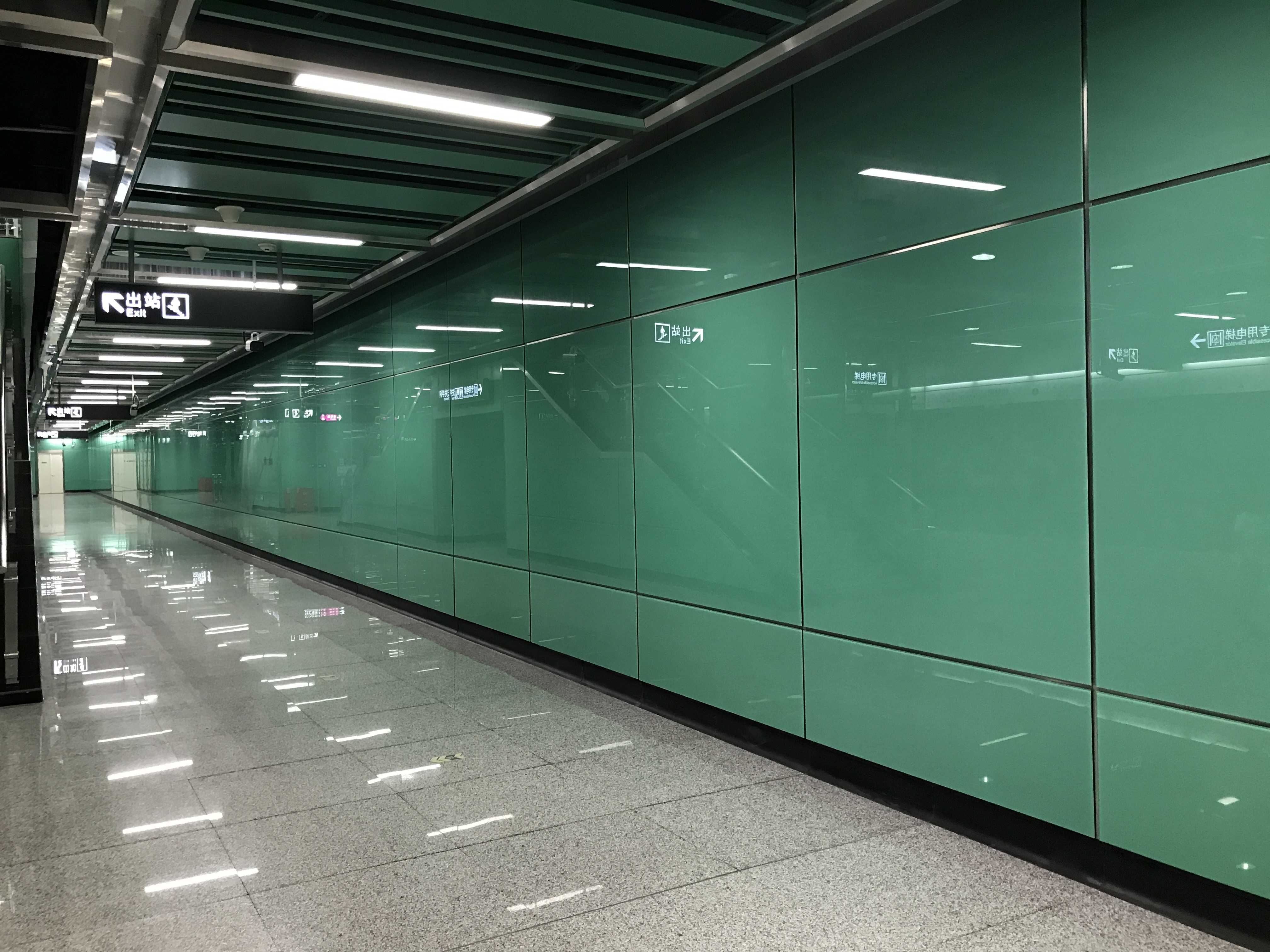 广州地铁植物园站